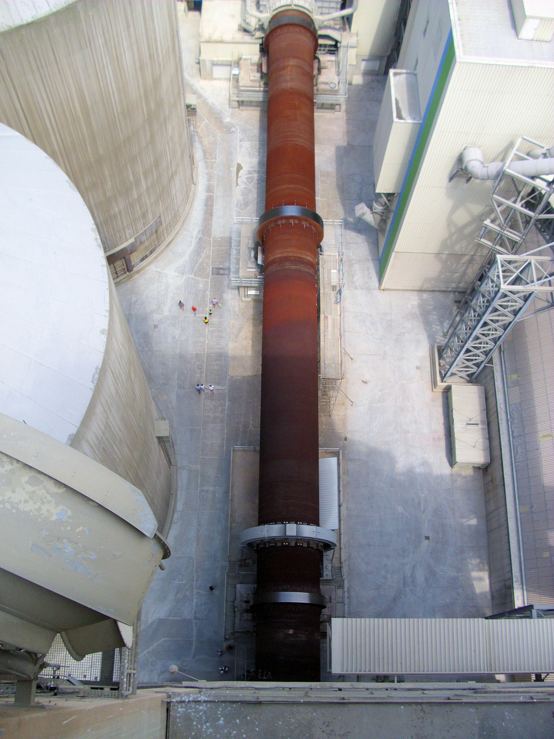 Drehrohrofen des Zementwerkes Rohrdorf vom Gebäudedach aus gesehen. Der Ofen ist ca. 84 Meter lang und hat ca. 4m Durchmesser. Er ist fast waagerecht montiert (3% Gefälle). Gebrannt wird bei ca. 2000°C. Die kleinen Punkte links sind Besucher anlässlich des "Tags der offenen Tür" 2012.